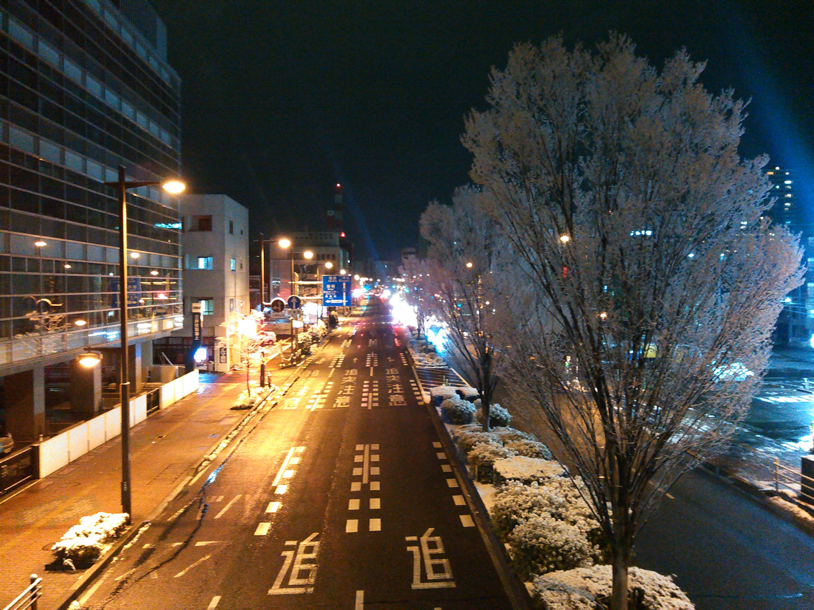 郡山市 昭和通り 堤下付近 雪